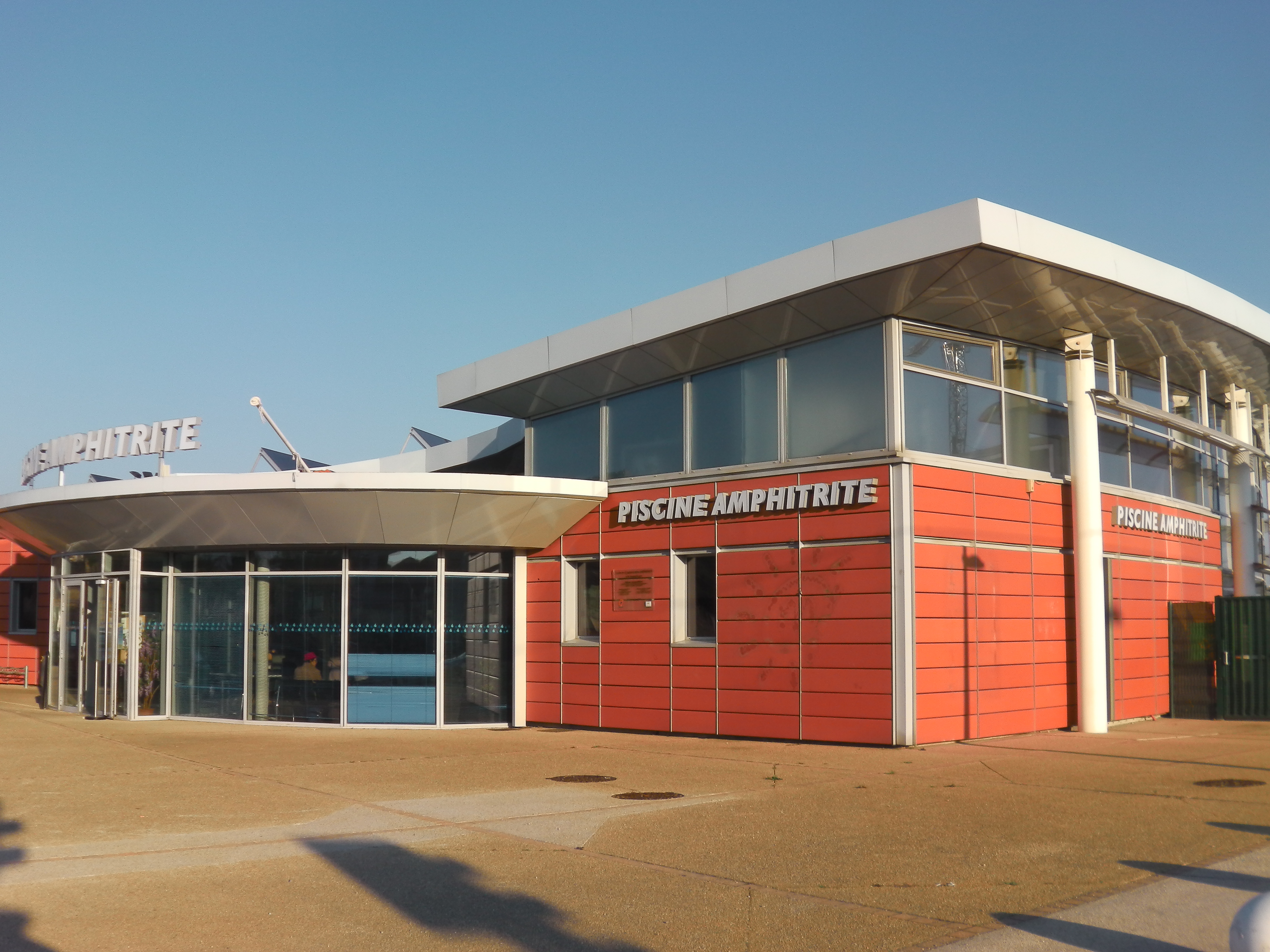 La piscine publique Amphitrite à Saint-Jean-de-Védas (Hérault, France).